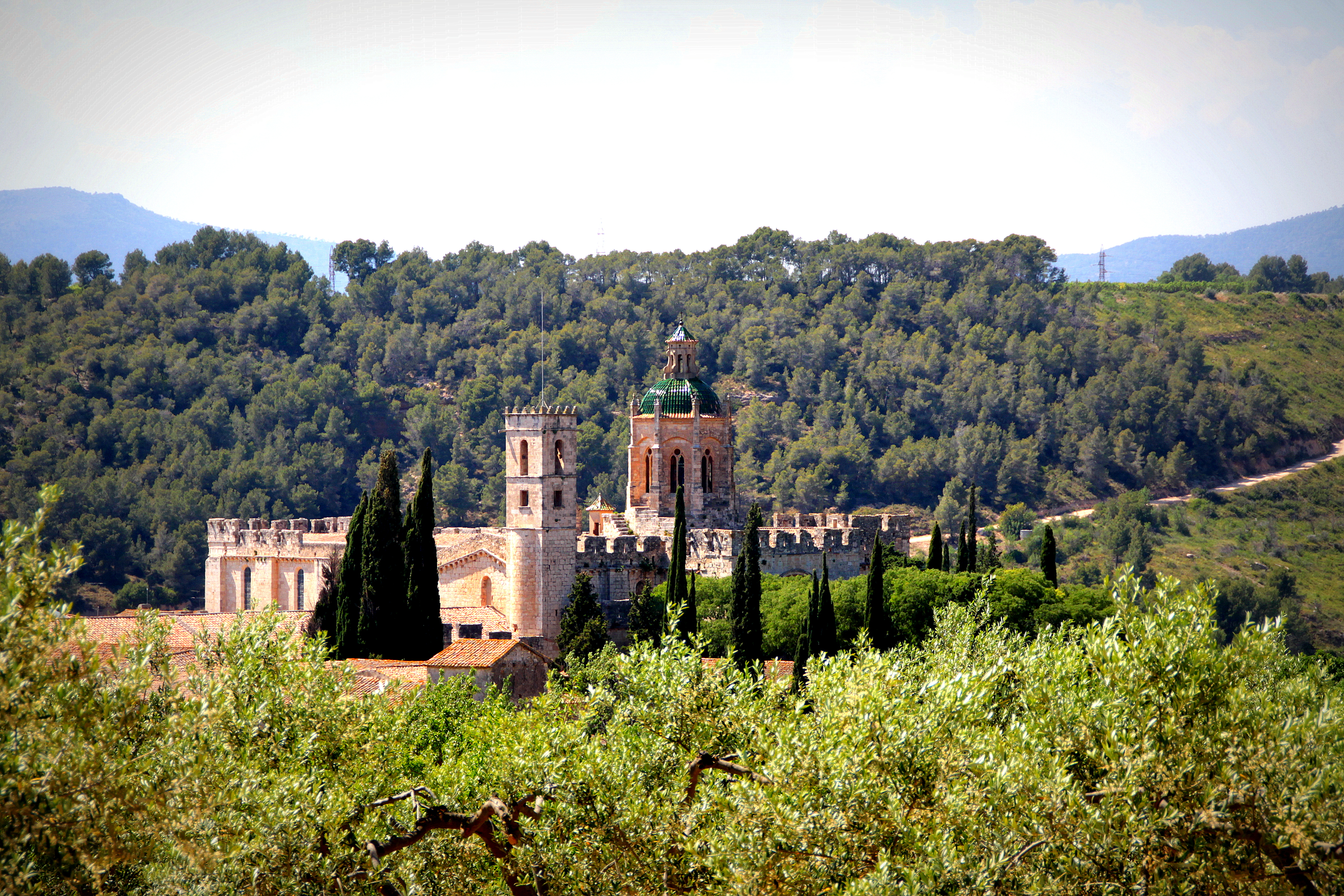 D'Abtei Santes Creus a Spuenien